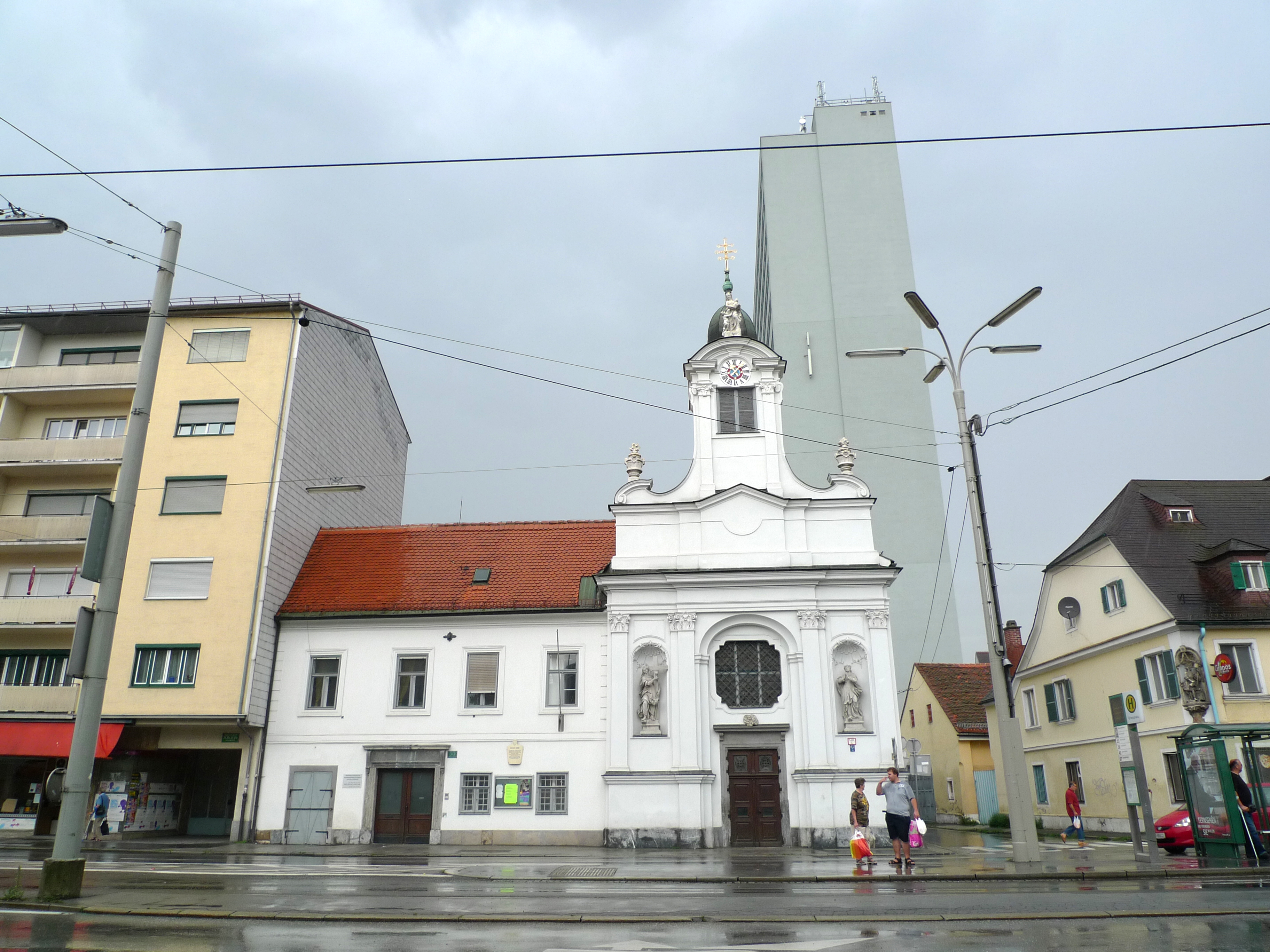 Kath. Pfarrkirche, Welsche Kirche, Lokalkaplanei hl. Franz de Paula samt Pfarrhof